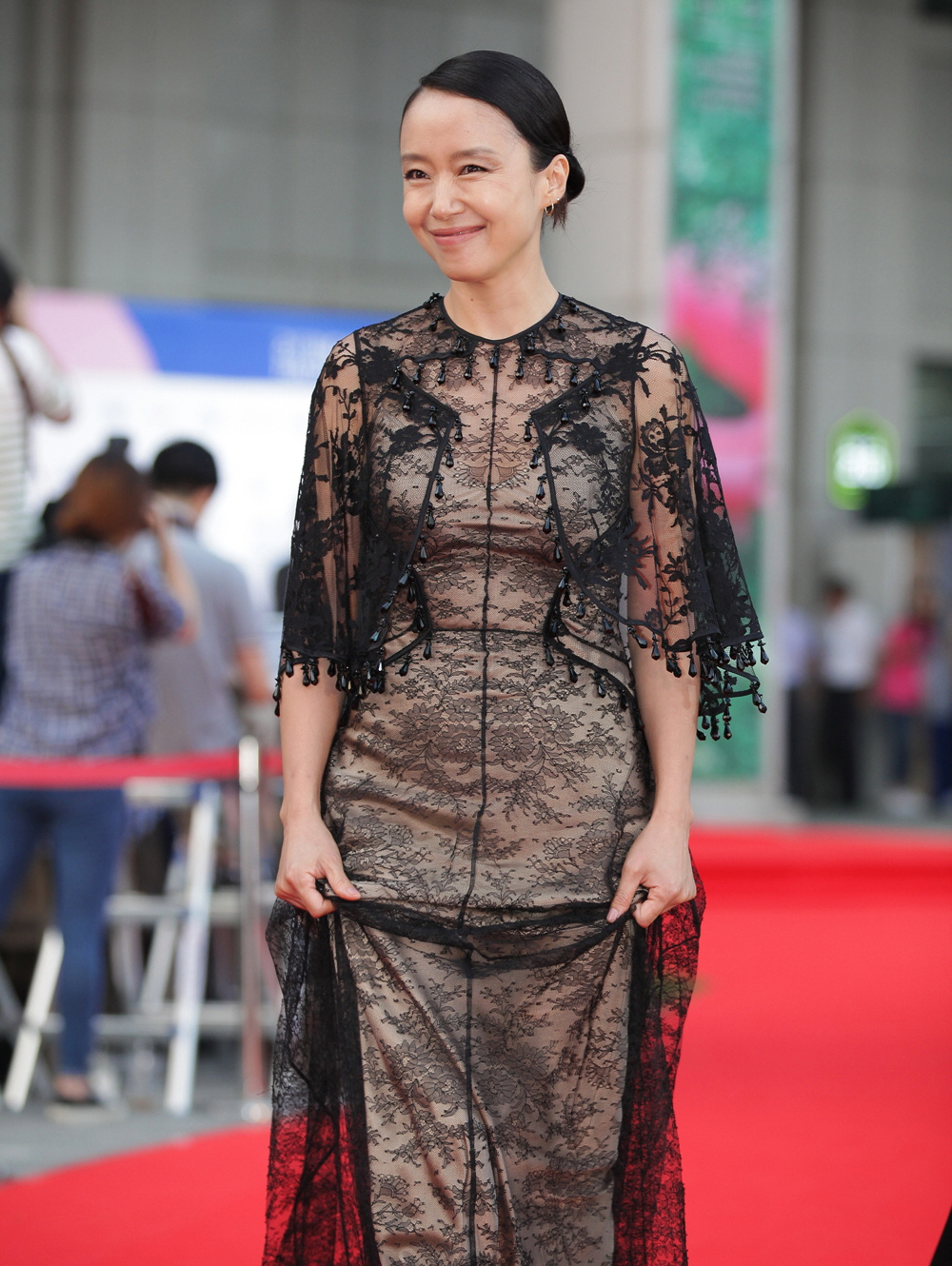 2017 부천국제판타스틱영화제(BIFAN) 레드카펫